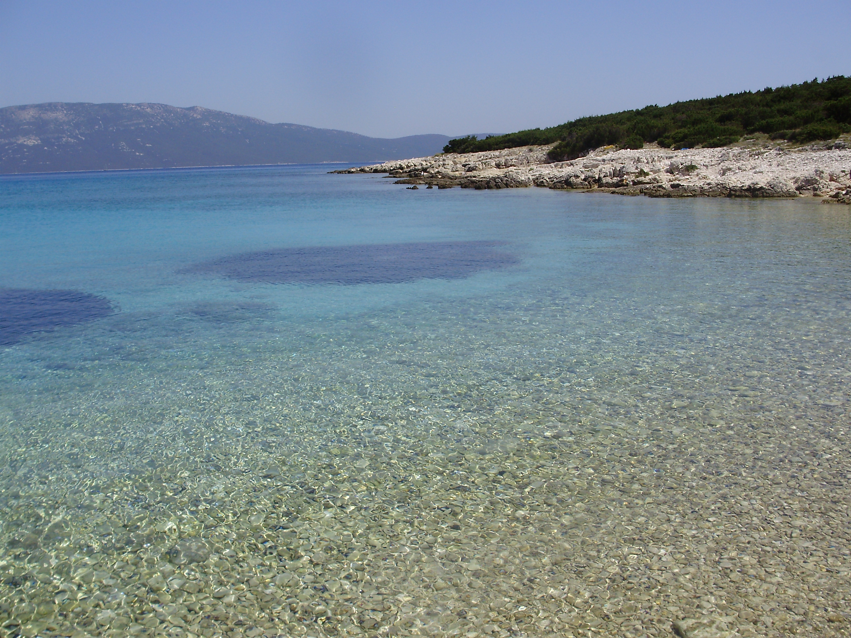 unije beach, uvala Podkujni